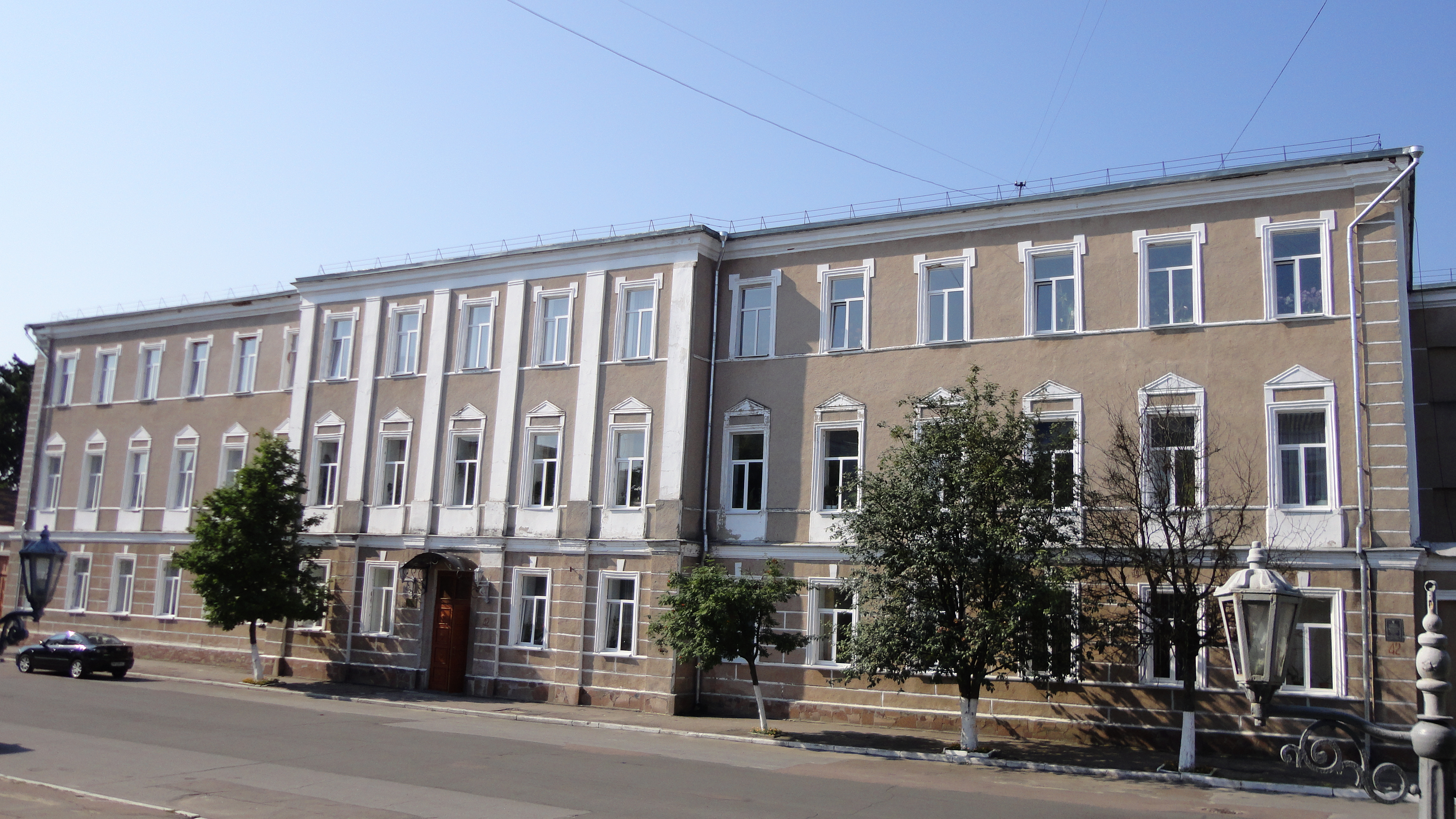 Єврейський вчительський інститут, Житомир